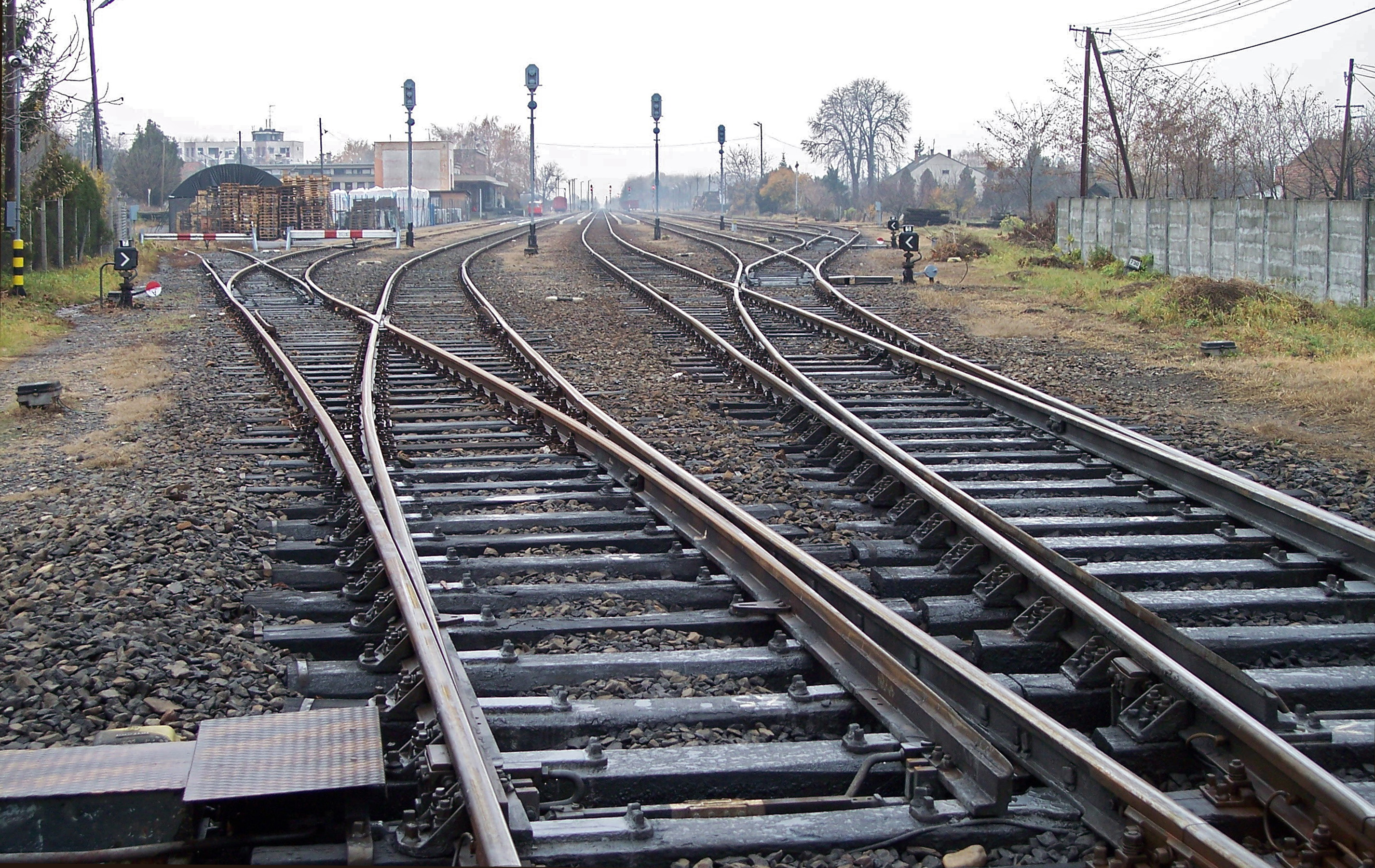 Railroad in Gyula (Hungary)